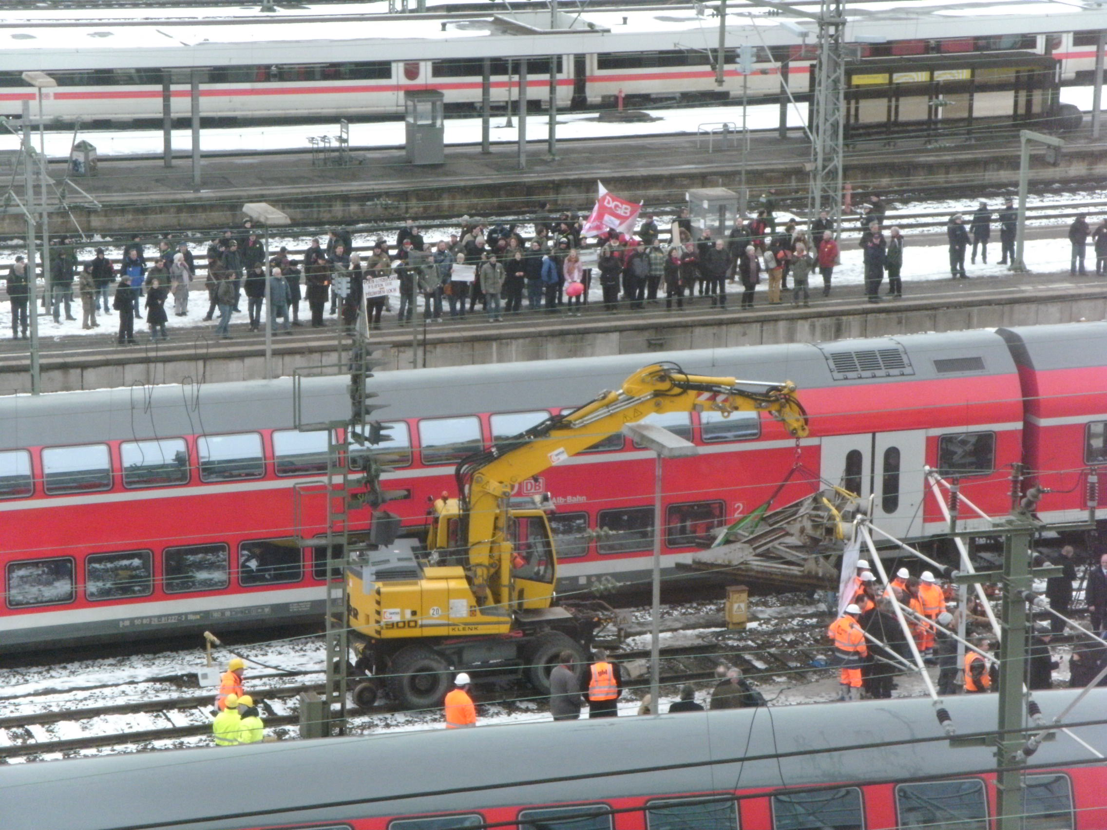 Der 'Erste Spatenstich' für S21